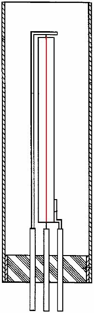 Prinzipaufbau eines Piranivakuummeters